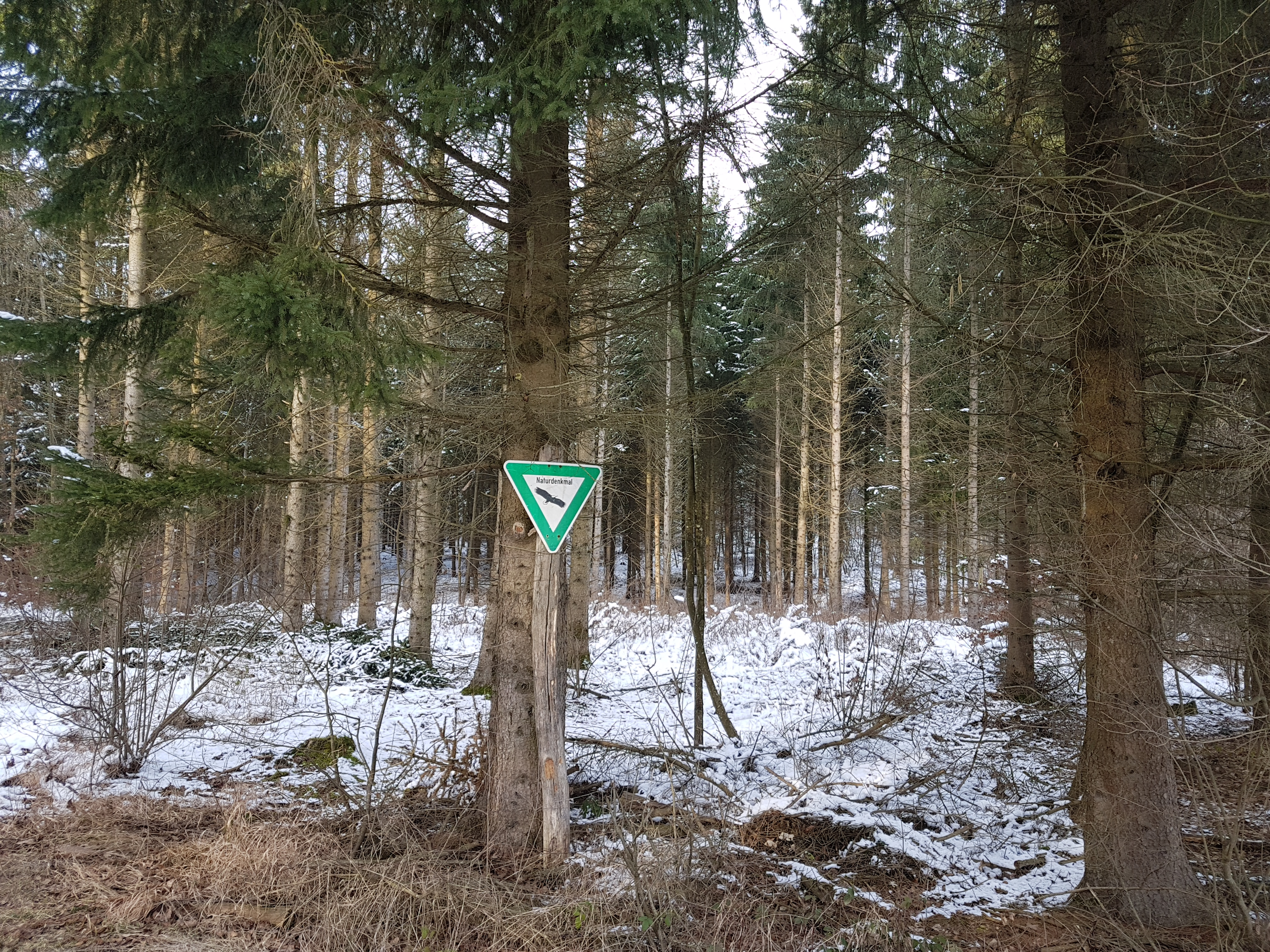 Bei dieser Doline (auch als Senke bezeichnet) im Assamstädter Gewann Stöckig handelt es sich um einen langgestreckten, vermutlich eingebrochenen unterirdischen Wasserlauf. Die Doline wurde am 21. Dezember 1981 als flächenhaftes Naturdenkmal ausgewiesen.